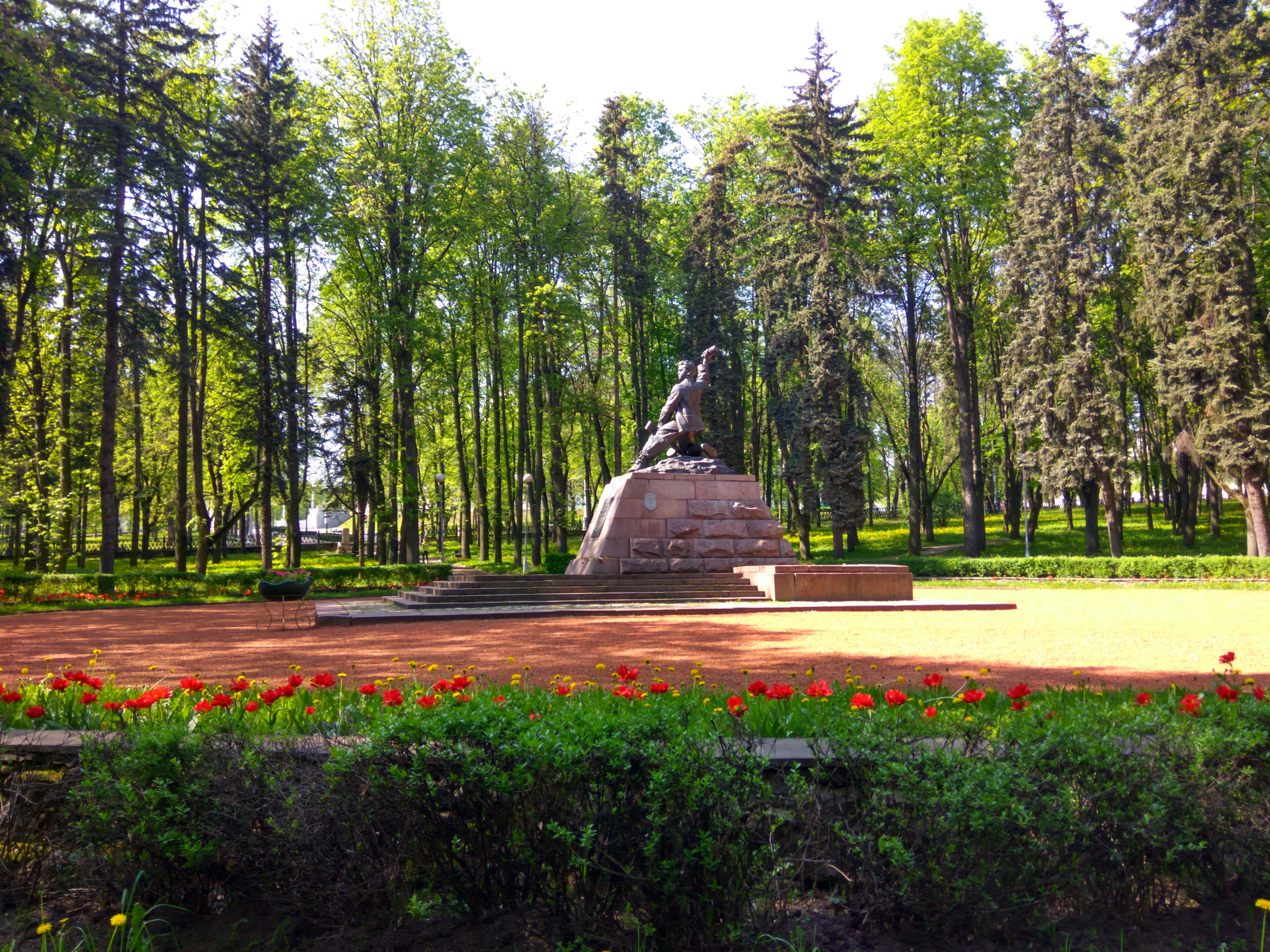 Мінск. Парк Марата Казея